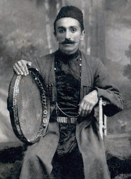 Cabbar Qaryağdıoğlu — Azərbaycan SSR xalq artisti